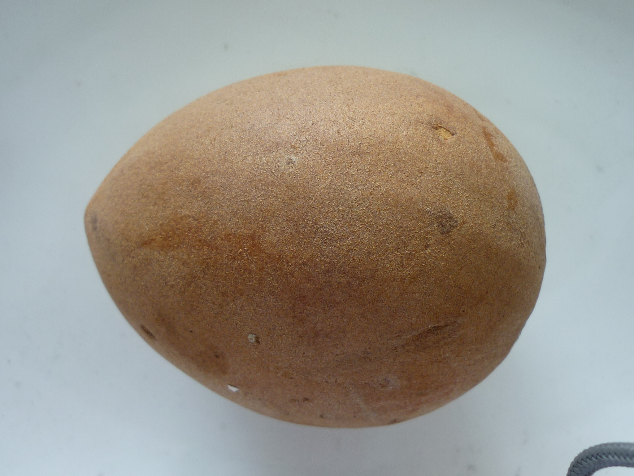 Níspero costeño